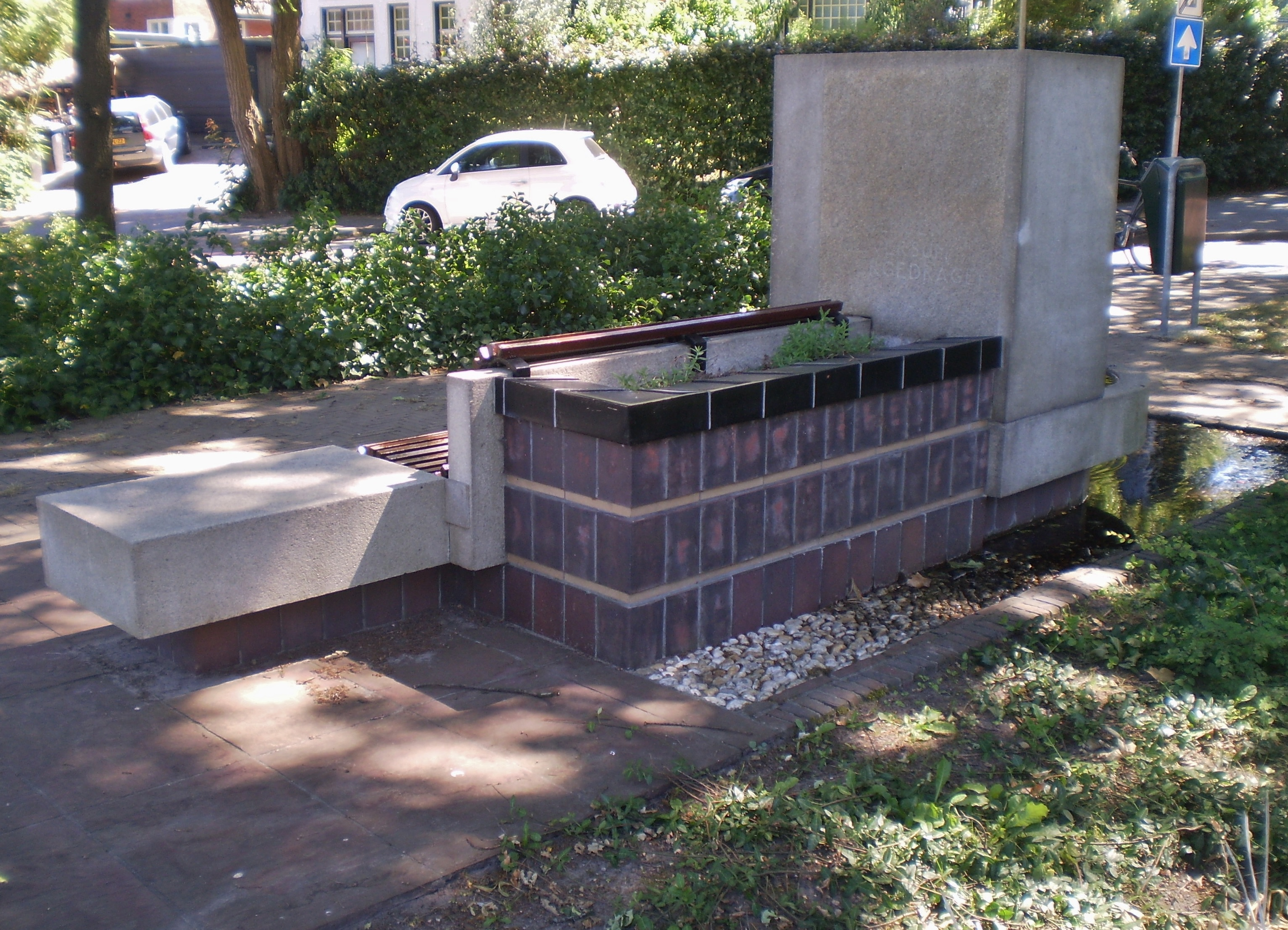 Achterzijde van de Van Reesbank